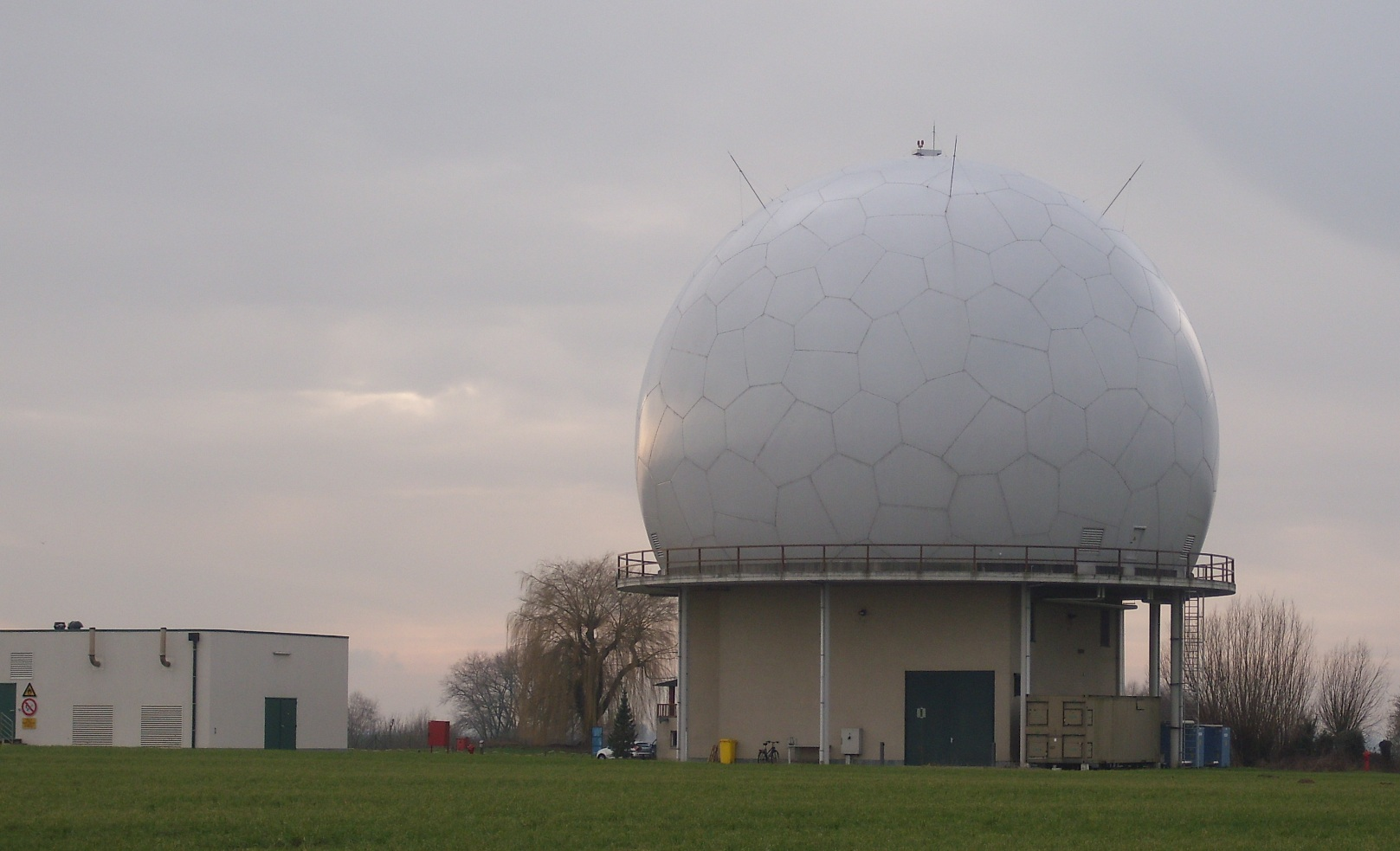 Militaire Air Traffic Control - Semmerzake - Gavere - Oost-Vlaanderen - België